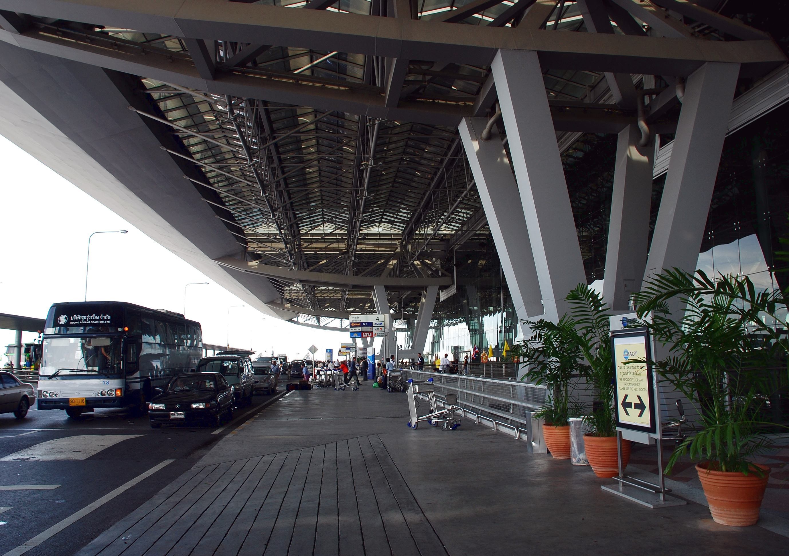 Suvarnabhumi Airport, Samut Prakan, Thailand.